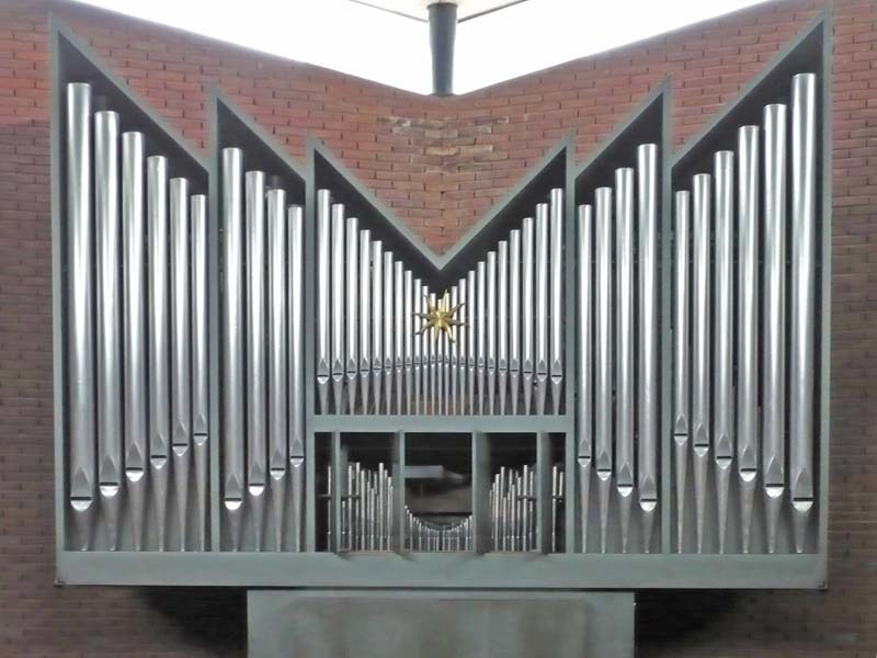 Orgel in der Versöhnungskirche Wolfenbüttel